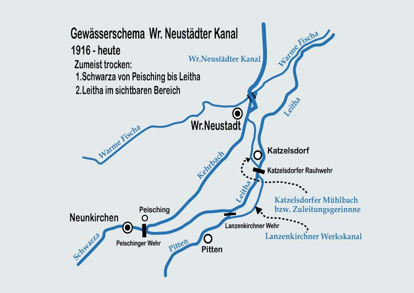 Die Wassereinspeisung des Wiener Neustädter Kanals von 1916 bis heute